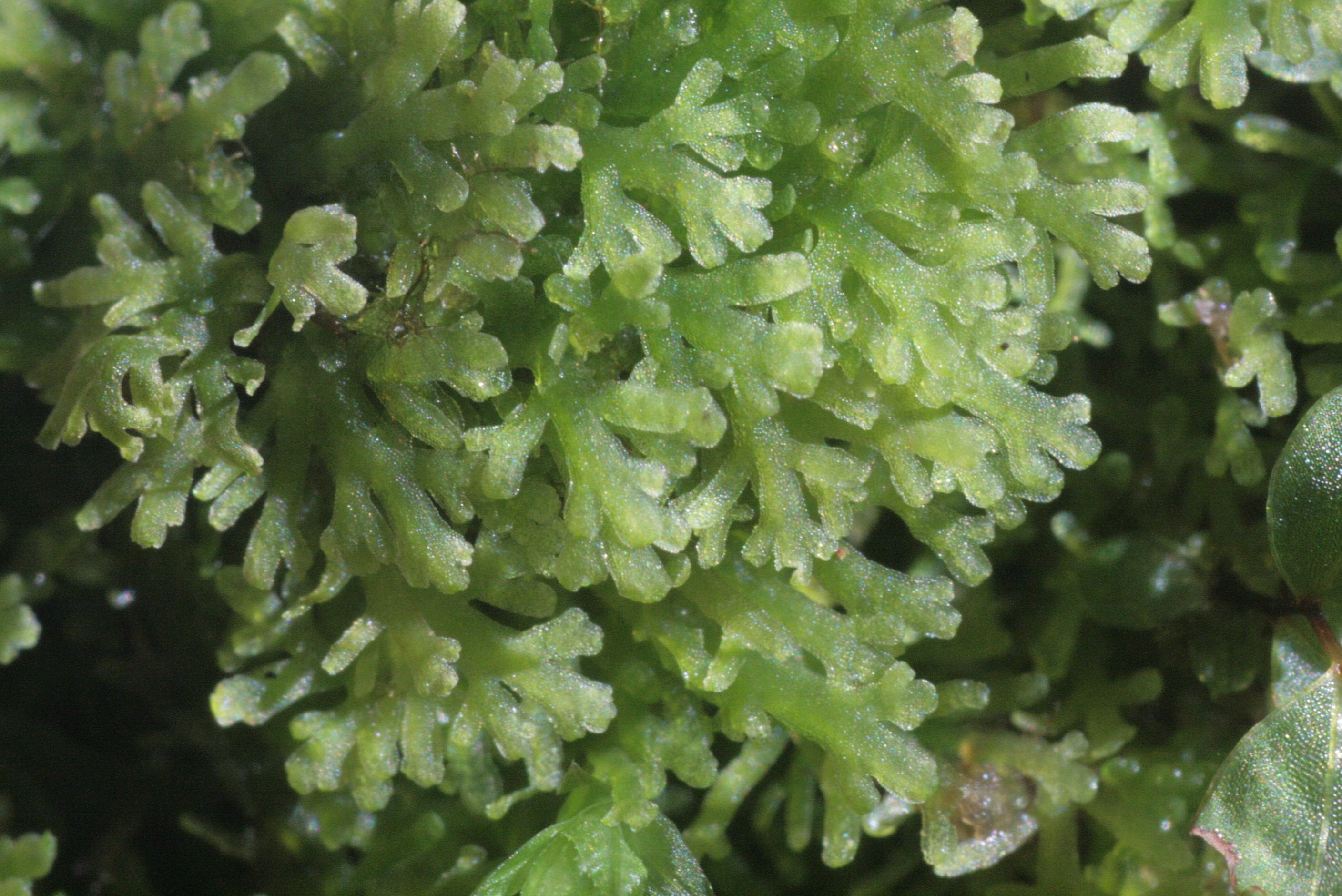 Vielspaltiges Riccardimoos (Riccardia multifida), Aufnahmeort: Ybbstal, Niederösterreich, Austria